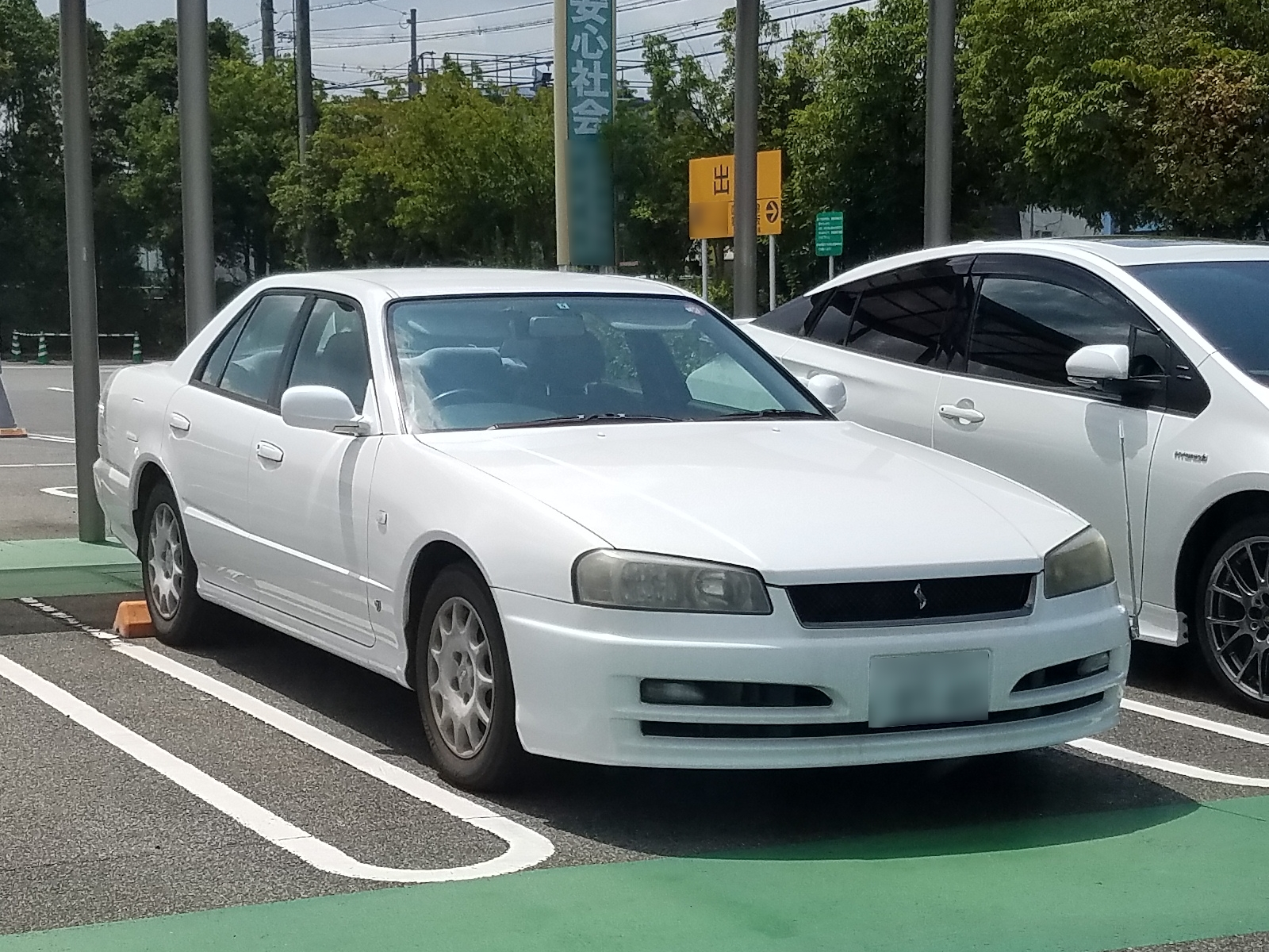 スカイラインセダン GT(後期型)